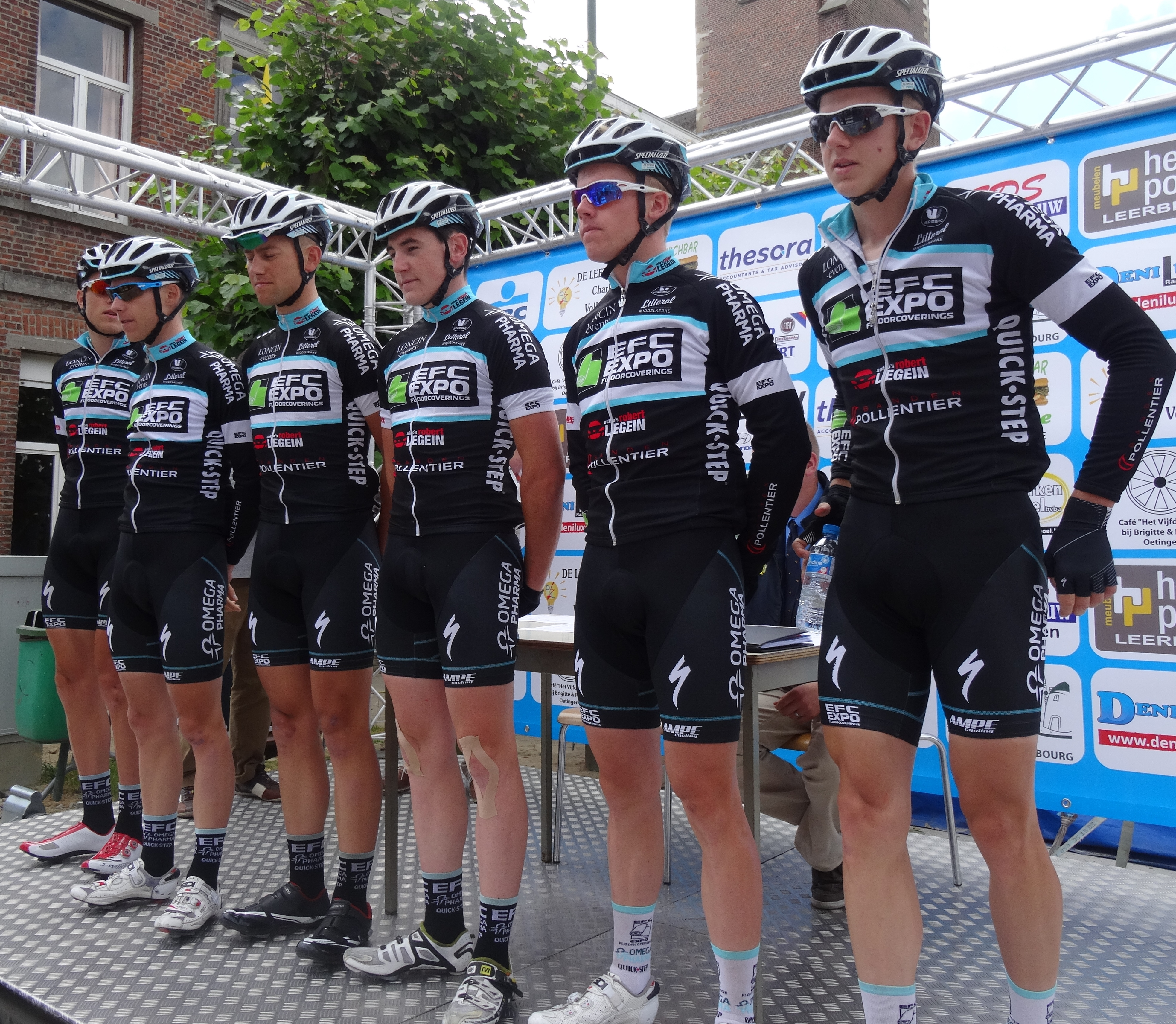 Reportage photographique réalisé le mercredi 25 juin à l'occasion du départ et de l'arrivée de l'Internationale Wielertrofee Jong Maar Moedig 2014 à Oetingen (Gooik), Belgique.